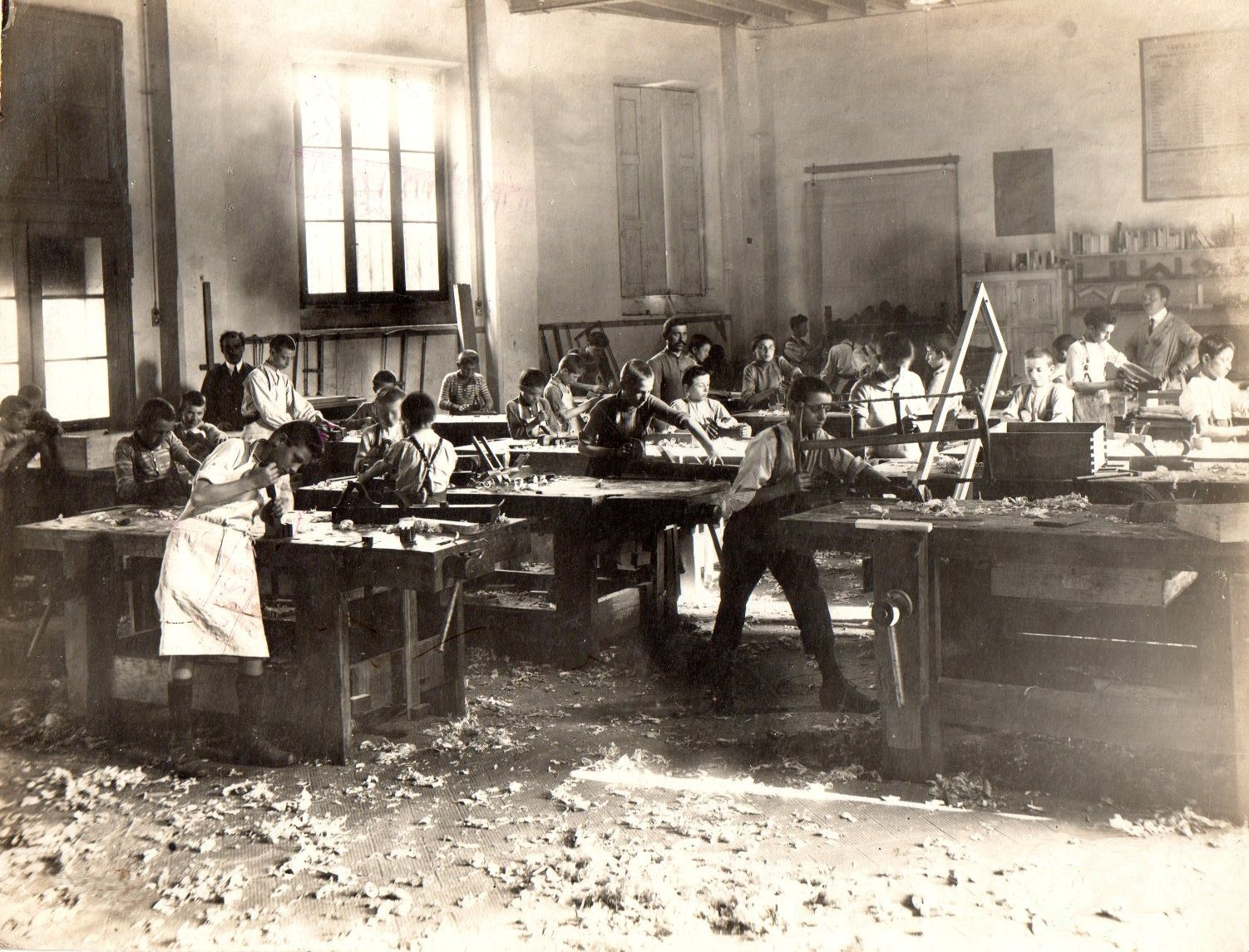 Laboratorio di Ebanisteria dove Ambrogio Fossati fu tra i primi insegnanti